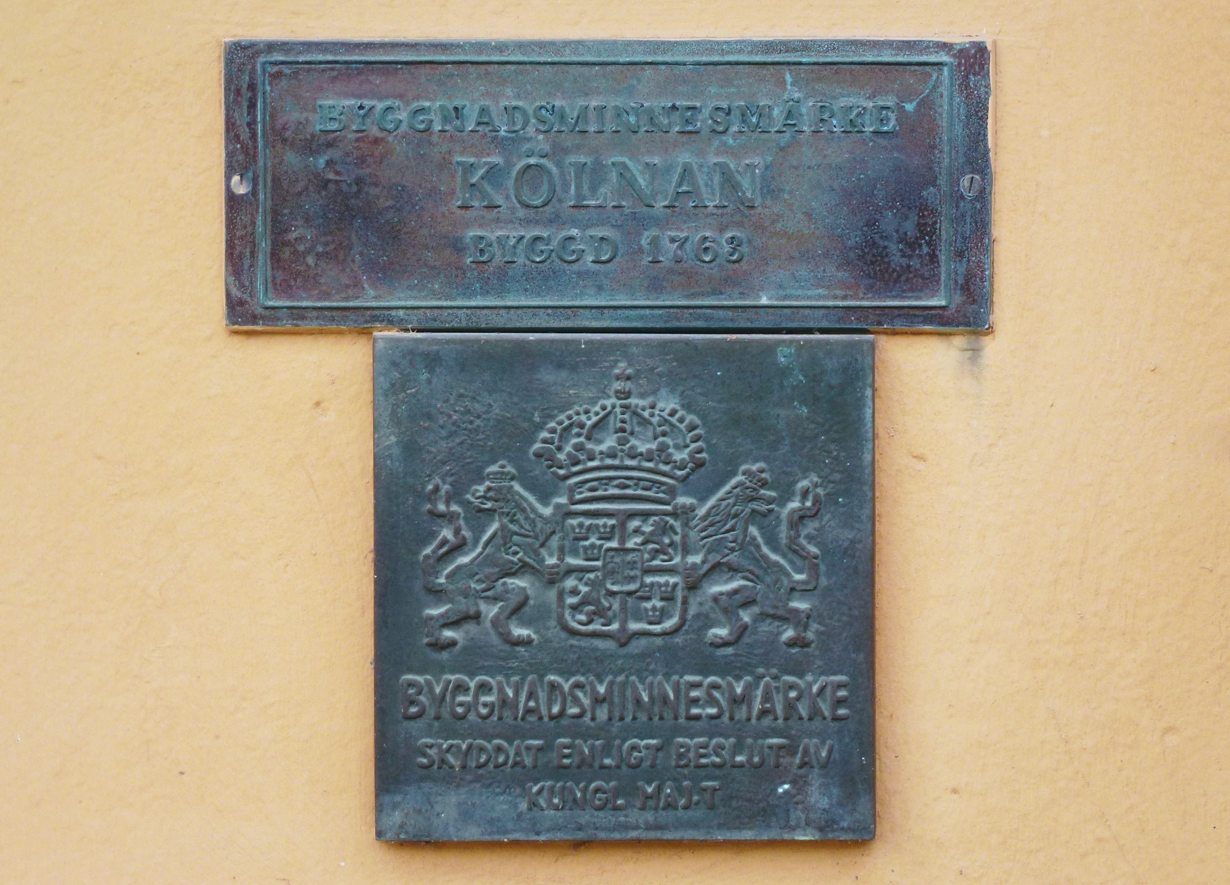 Tumba bruk, Kölnan byggnadsminne